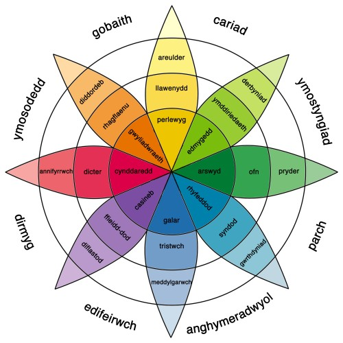 Addasiad Cymraeg o Gylch Emosiwn Plutchik